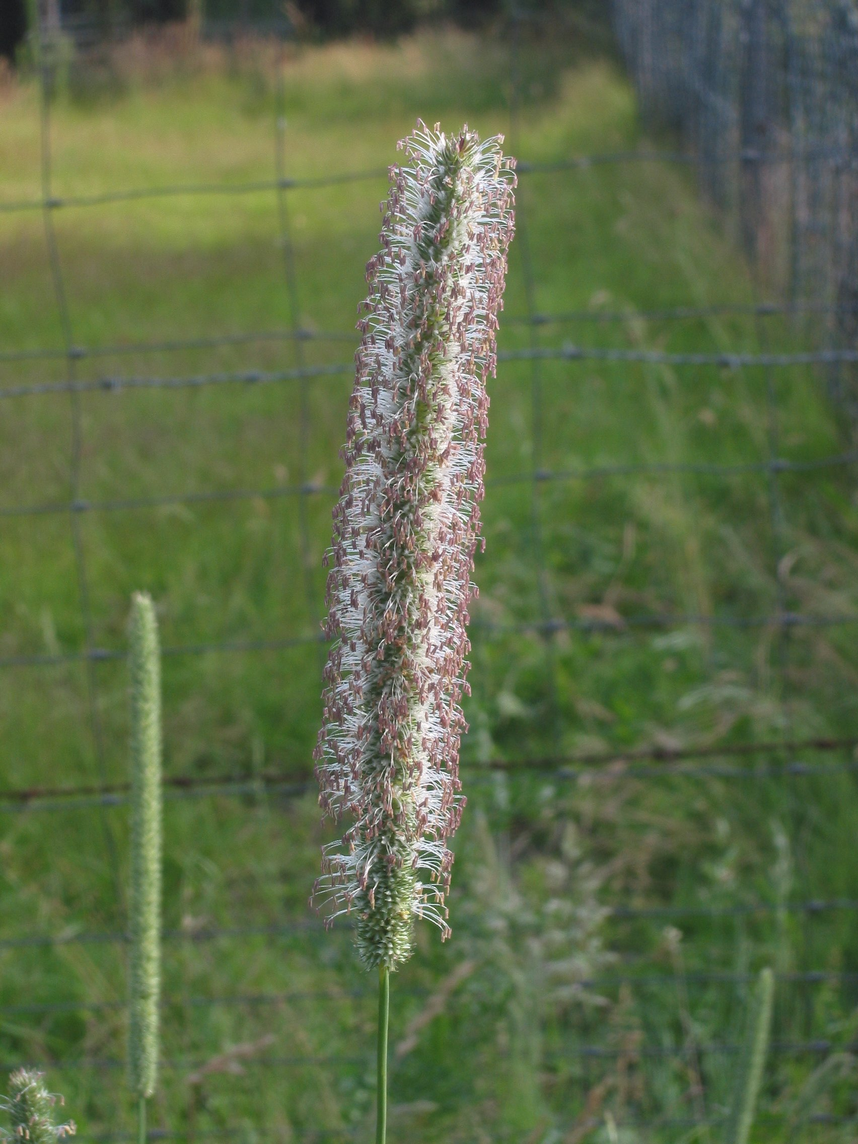 (nl: Timothee bloeiwijze) Phleum pratense subsp. pratense inflorescens